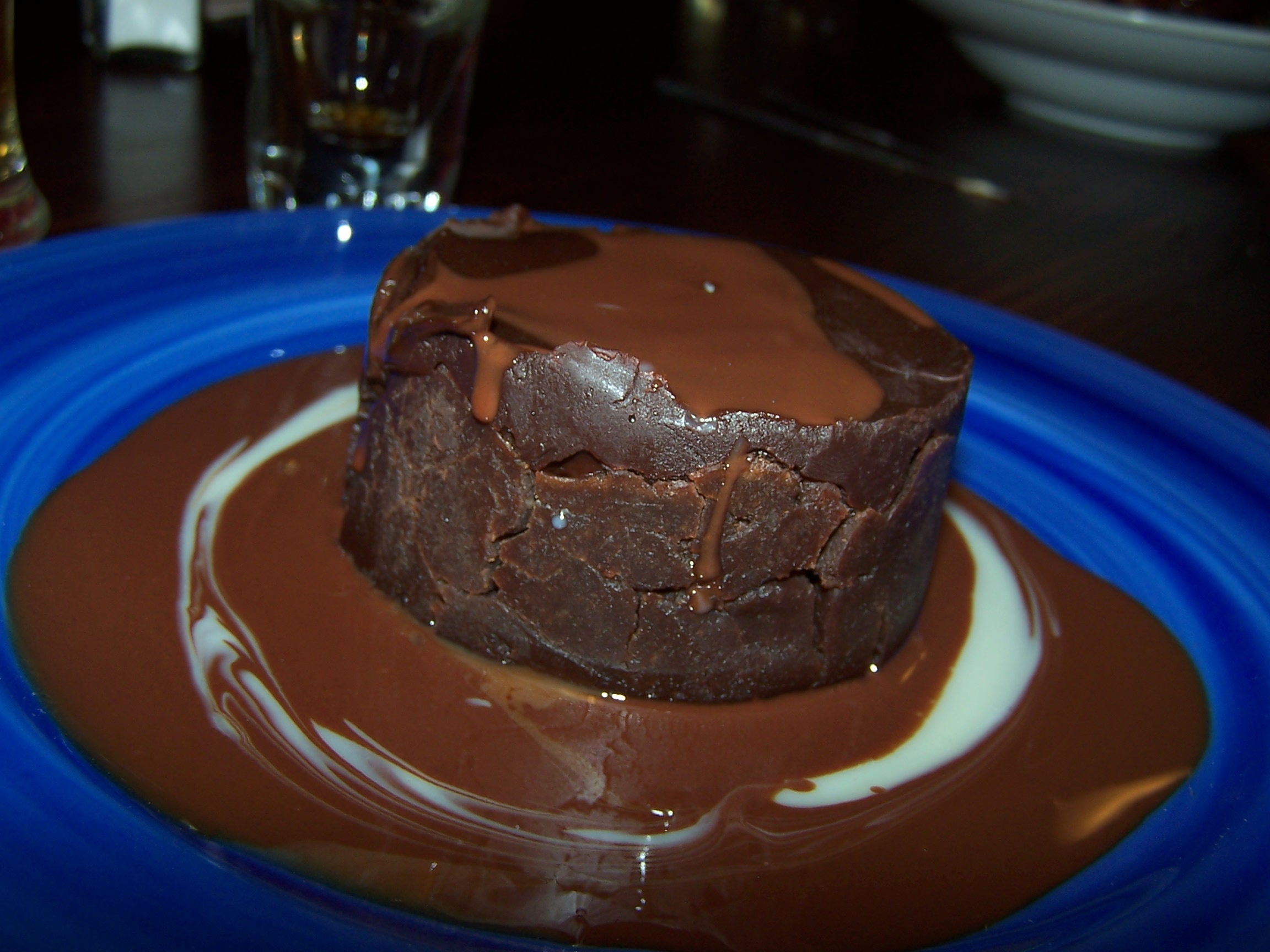 A fudge cakeFudge